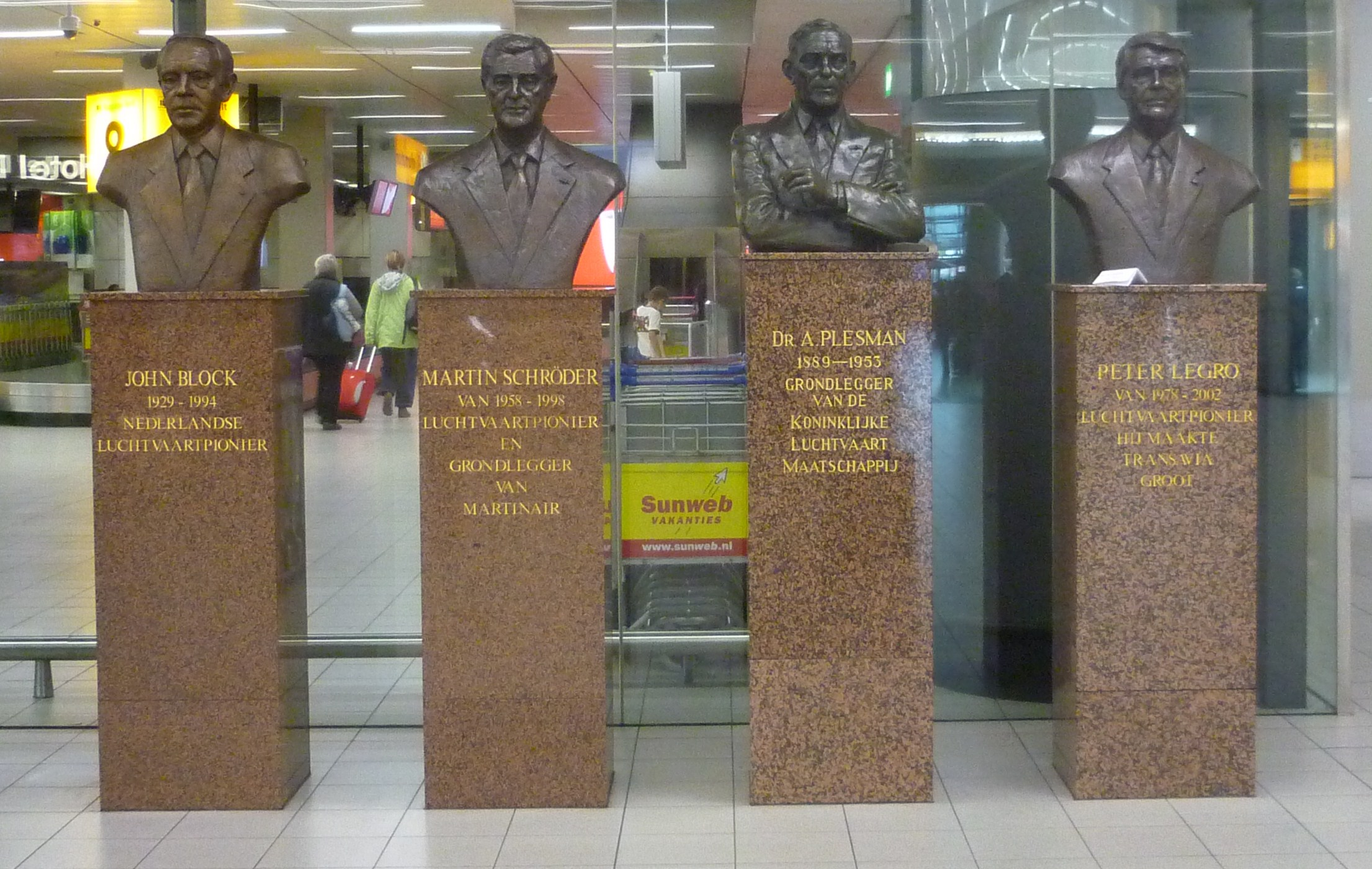 Vier beelden van Kees Verkade op Schiphol